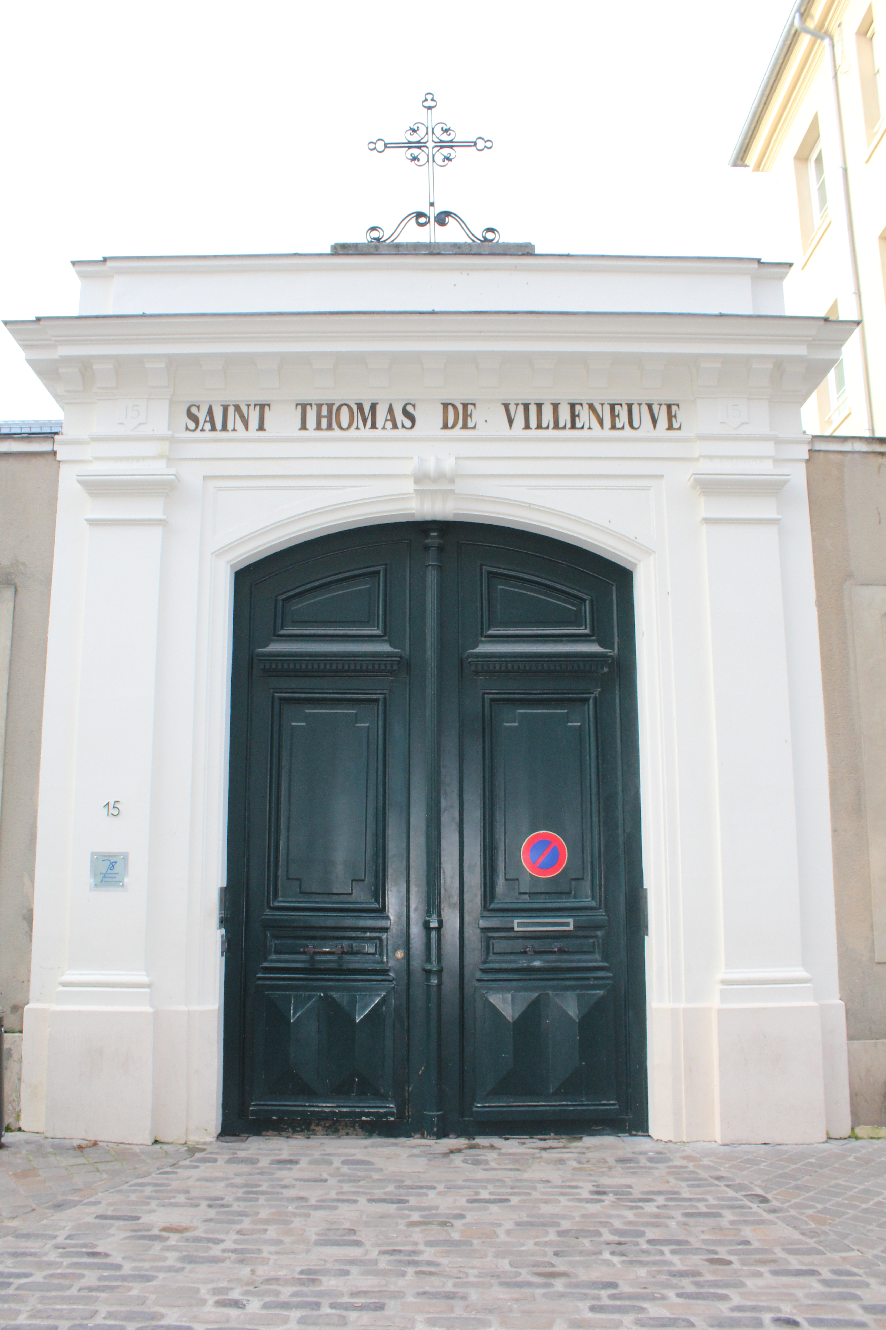 Entrée du couvent des Dames de Saint-Thomas, Saint-Germain-en-Laye.